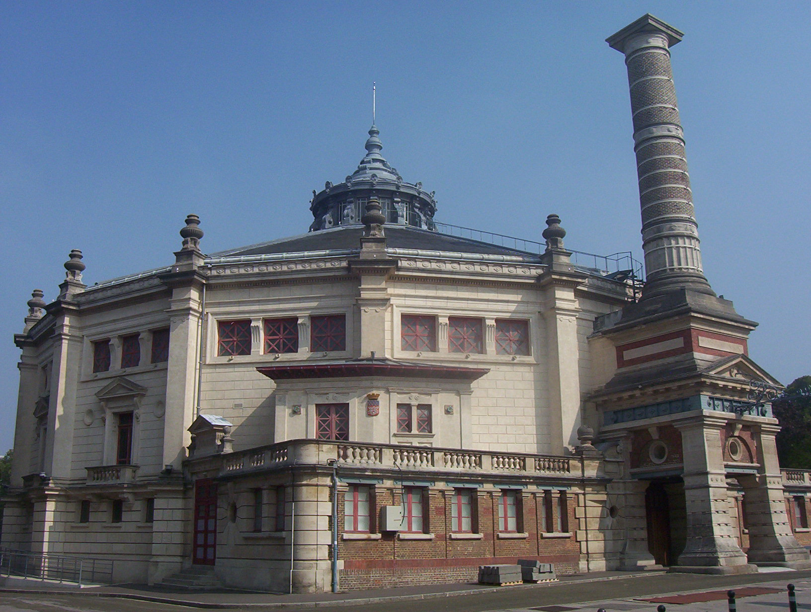 Cirque municipal d'Amiens : entrée des Artistes